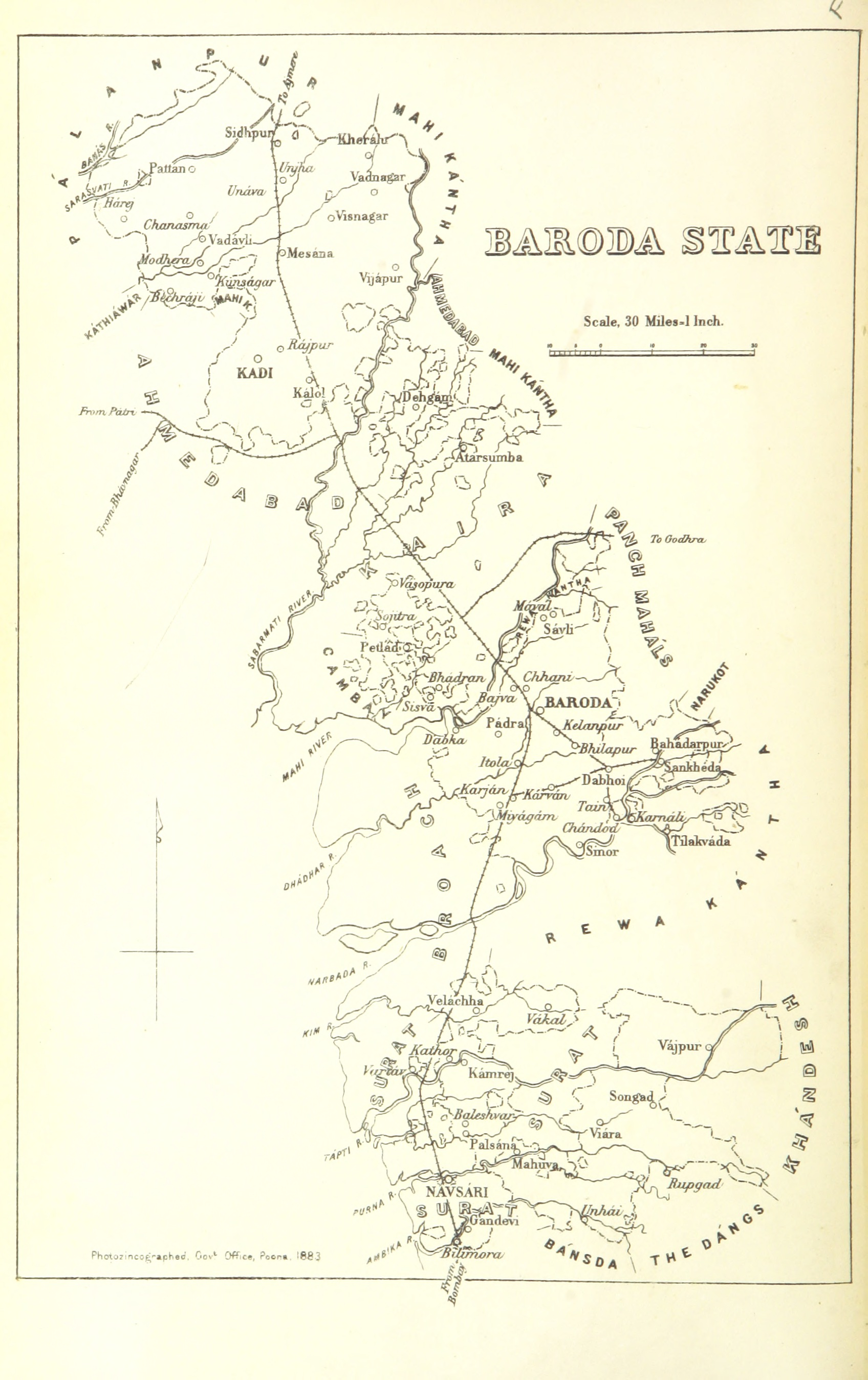 Baroda State 1896